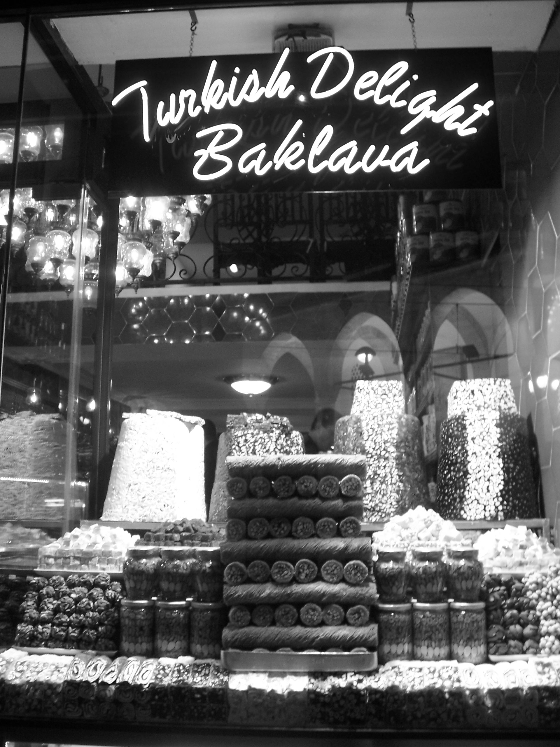 Pâtisserie turque à proximité d'Aya Sophia.